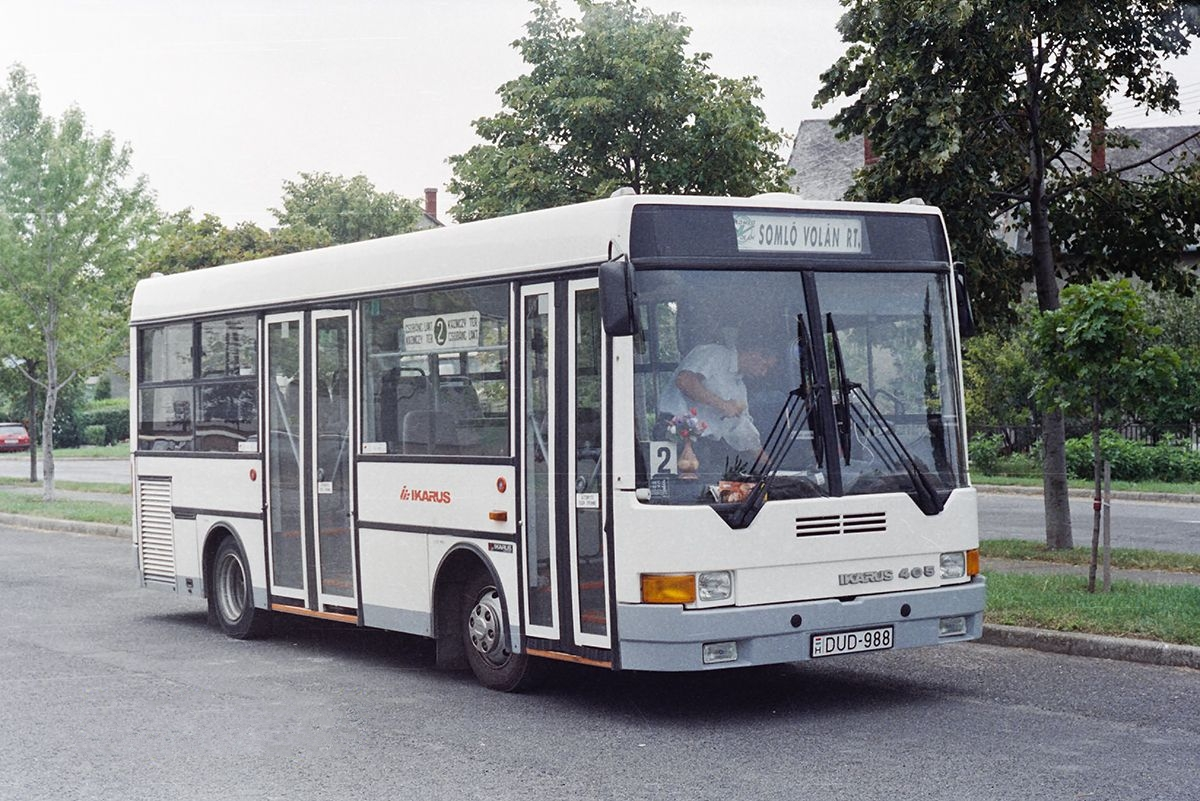 Ikarus 405 (DUD-988) alacsony padlós városi-elővárosi midibusz Tapolcán, a Juhász Gyula utcában (gyártási év: 1994)